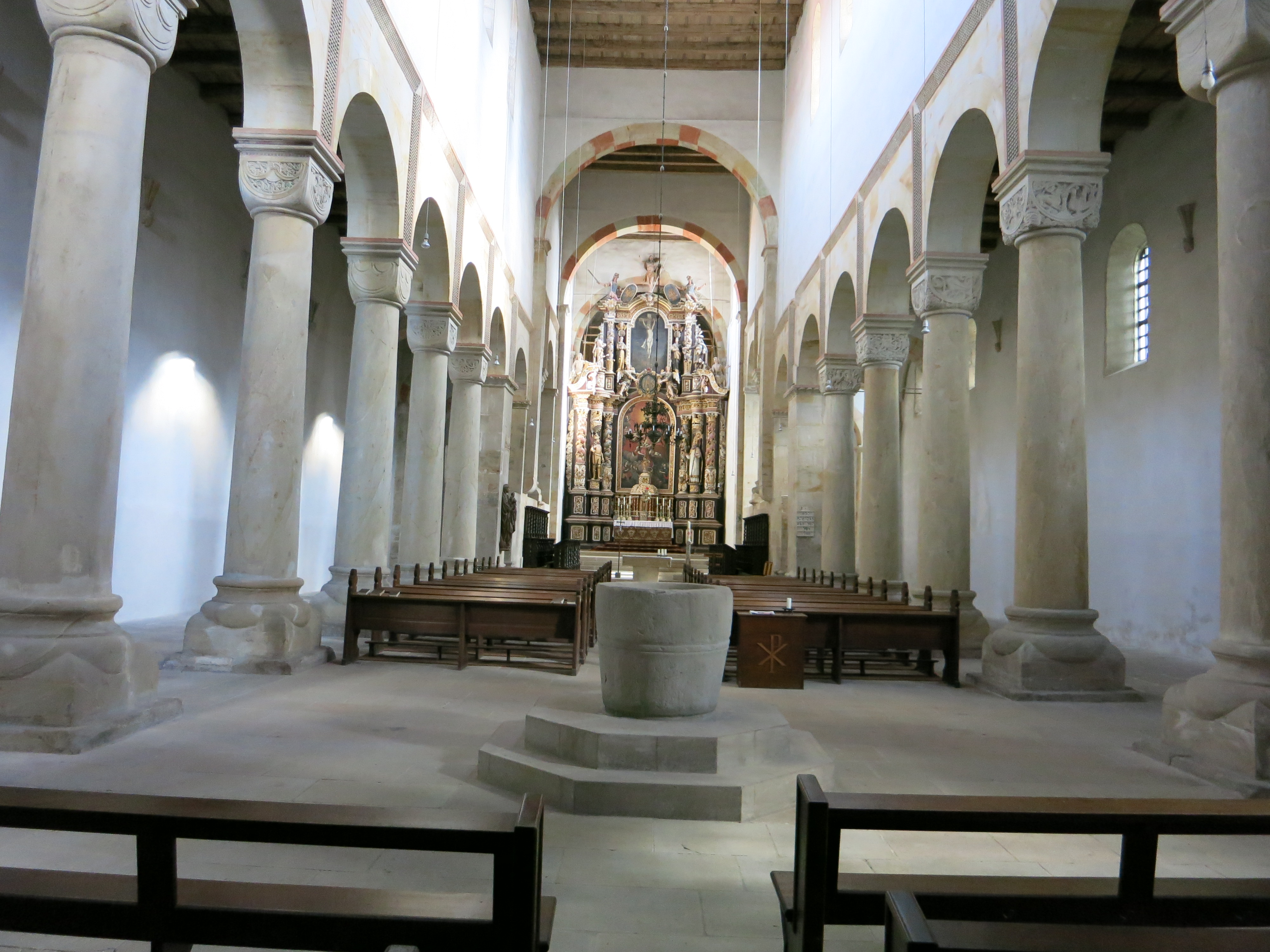 Kloster Hamersleben